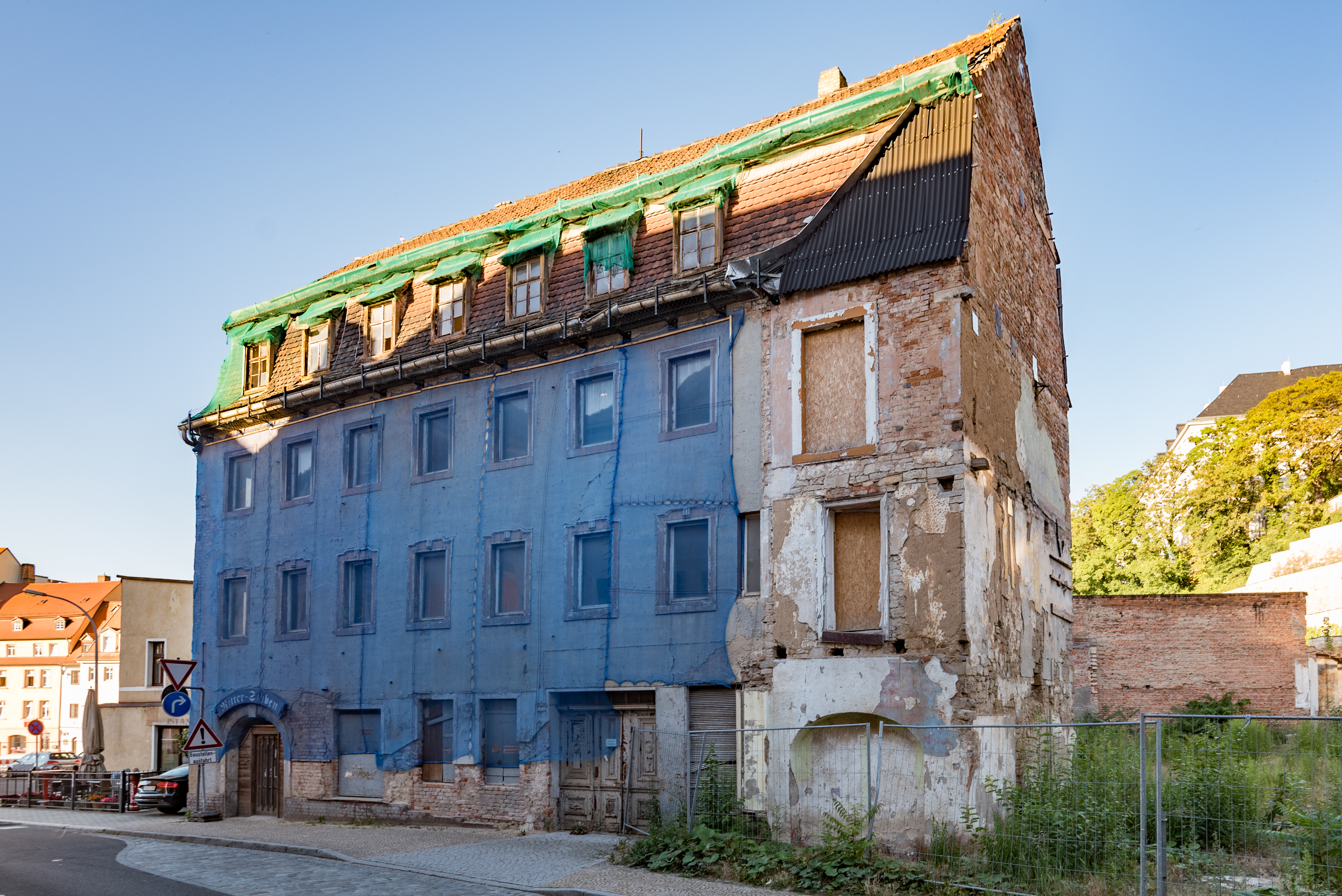 Weißenfels, Große Burgstraße 4